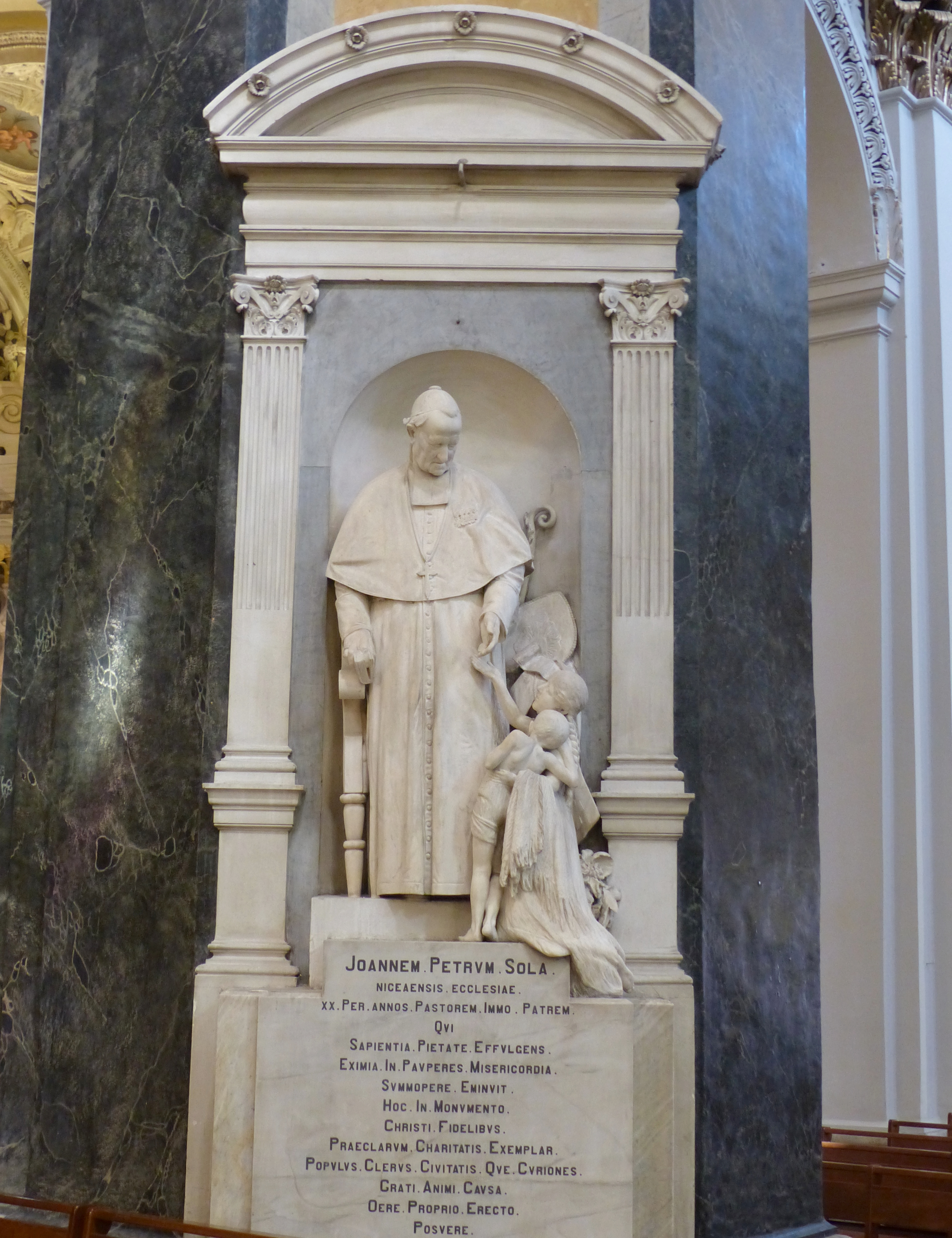 Nice (Alpes-Maritimes, France), cathédrale Ste Réparate, contre le pilier nord-ouest de la croisée du transept, monument à la mémoire de Mgr Jean-Pierre Sola (1791-1881), évêque de Nice de 1857 à 1877.